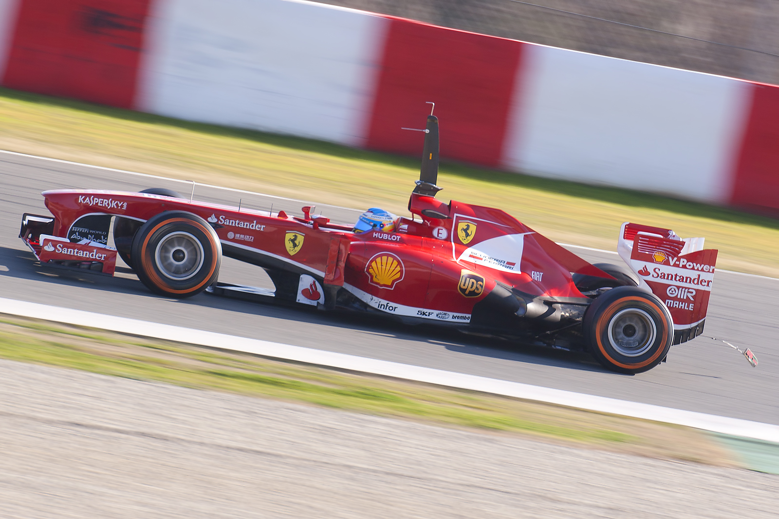 F1 Tests - Circuit de Catalunya, Spain.